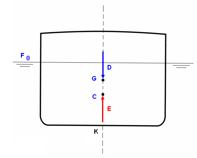 Posición inicial de equilibrio (spanish)